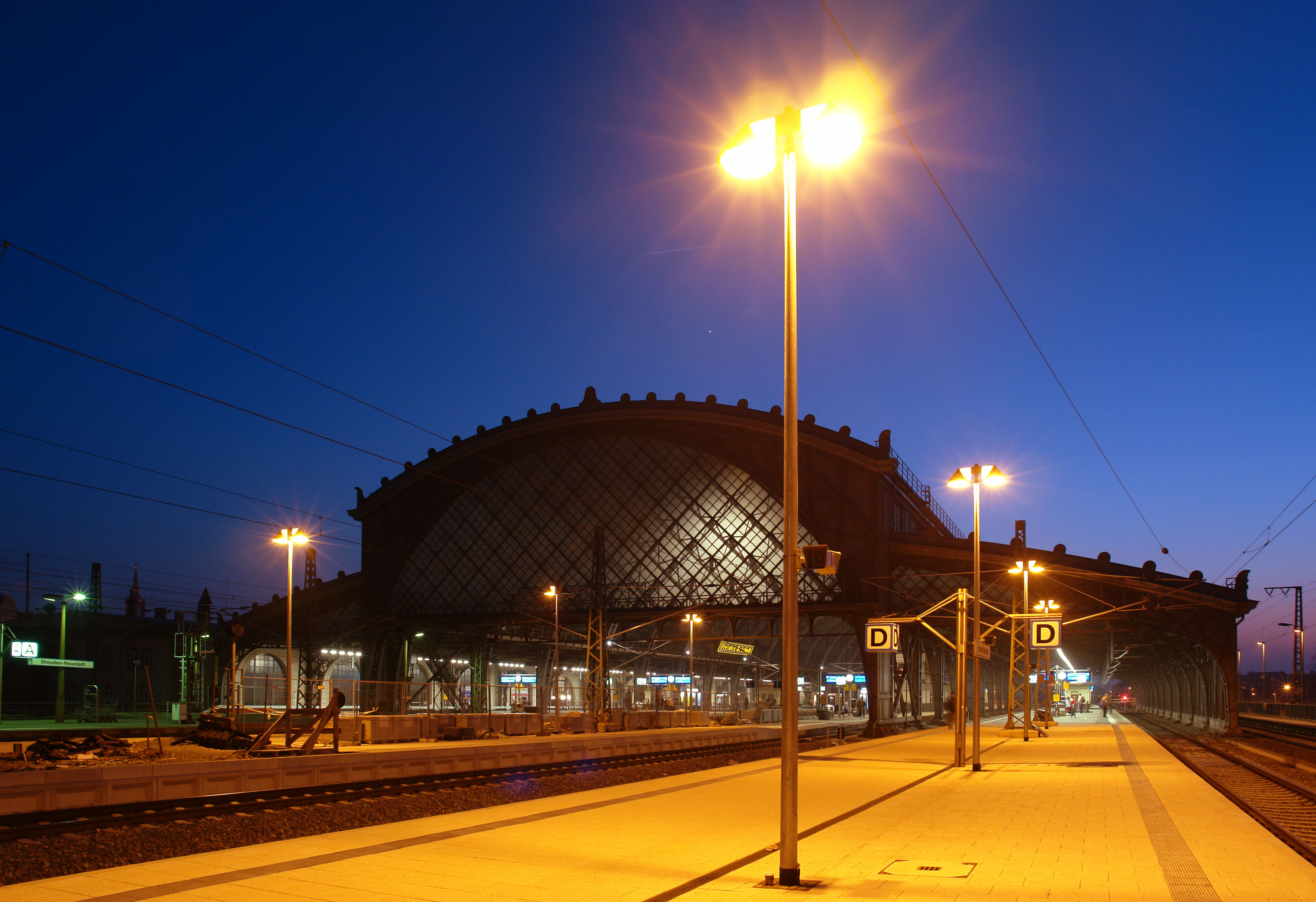 Bahnhof Dresden-Neustadt